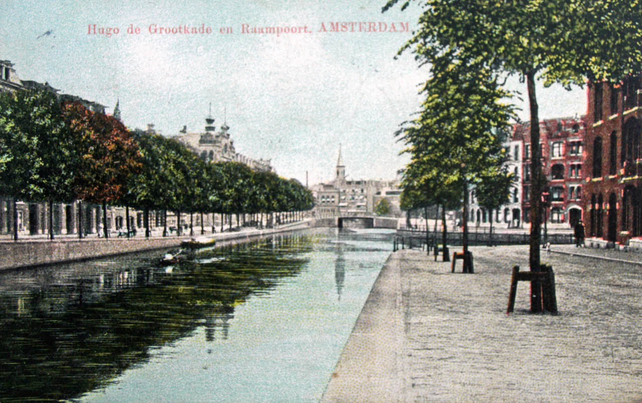 Hugo de Grootkade en -gracht, gezien vanaf de Bilderdijkstraat in oostelijke richting. Rechts de Da Costakade en -gracht. Op de achtergrond de Nassaukade met brug 166, daarachter is het politiebureau Raampoort te zien. Links zijn de twee torentjes zichtbaar van de gereformeerde Raamkerk, die in 1964 gesloopt is.